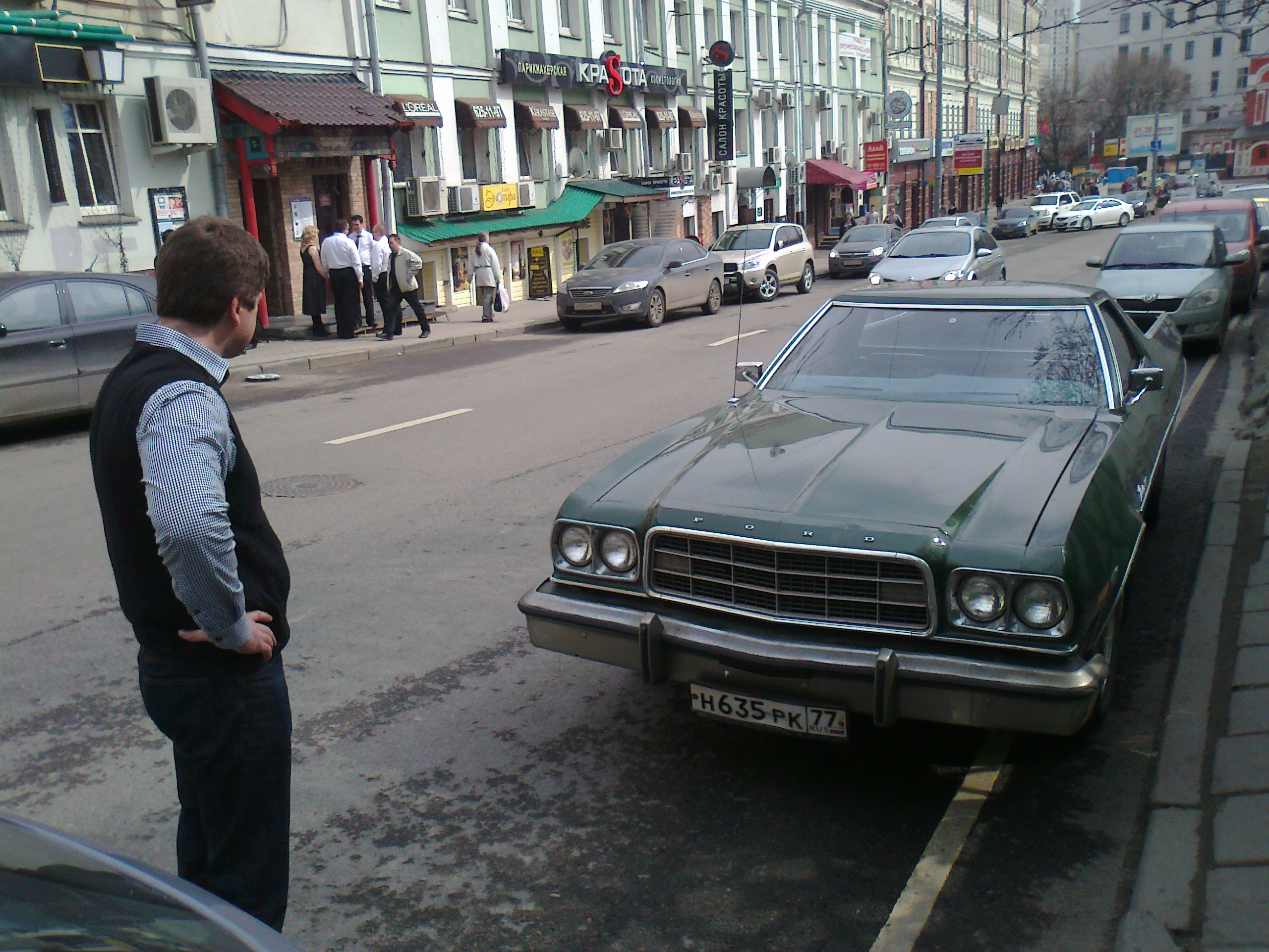 Ford Ranchero 1973, принадлежавший Sergey Kurkin SS